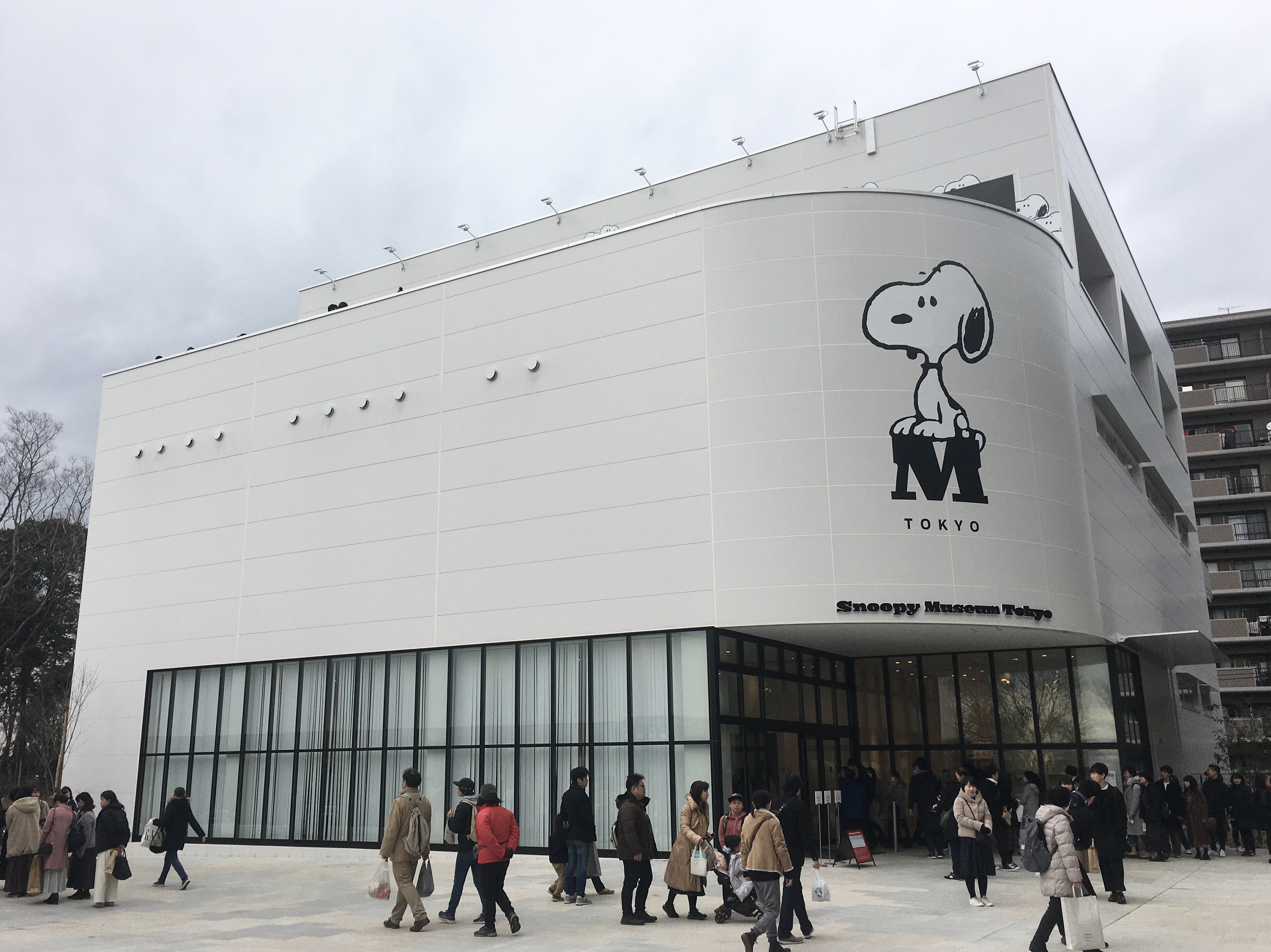 南町田グランベリーパーク内に2019年12月オープンしたスヌーピーミュージアム。